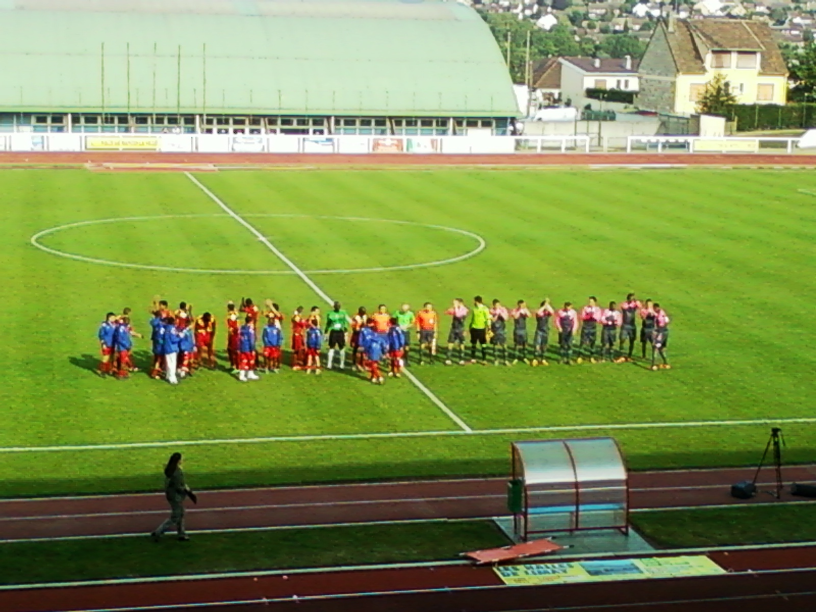 Présentation des équipes lors du match FC Mantois 78 - RC Lens B du 07 mai 2011 au stade Aimé-Bergeal